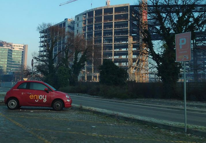 Parcheggio Enjoy a San Donato Milanese (gennaio 2020)